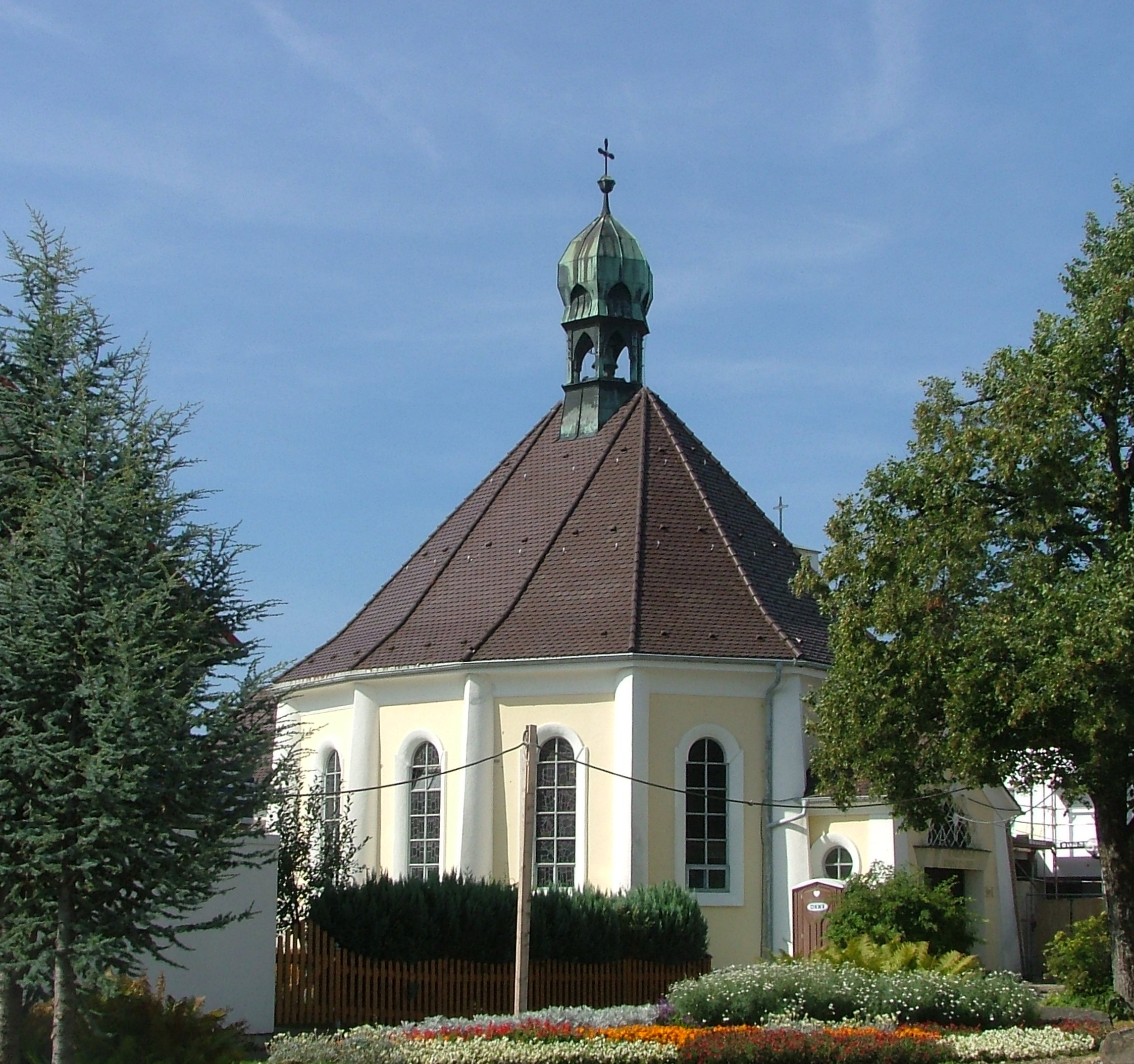 Magnusstraße 21